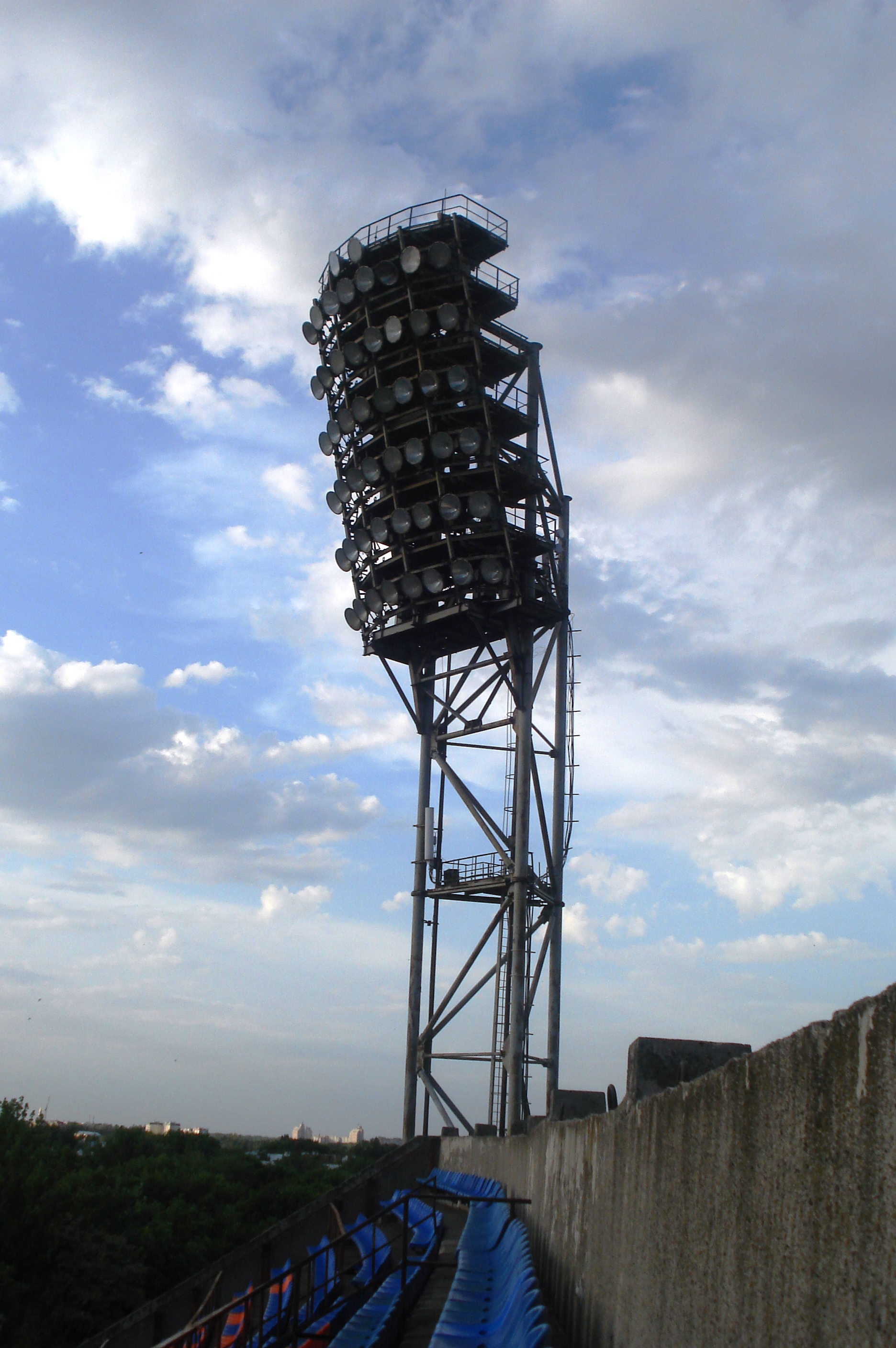 Лампы освещения стадиона "Труд" в Воронеже